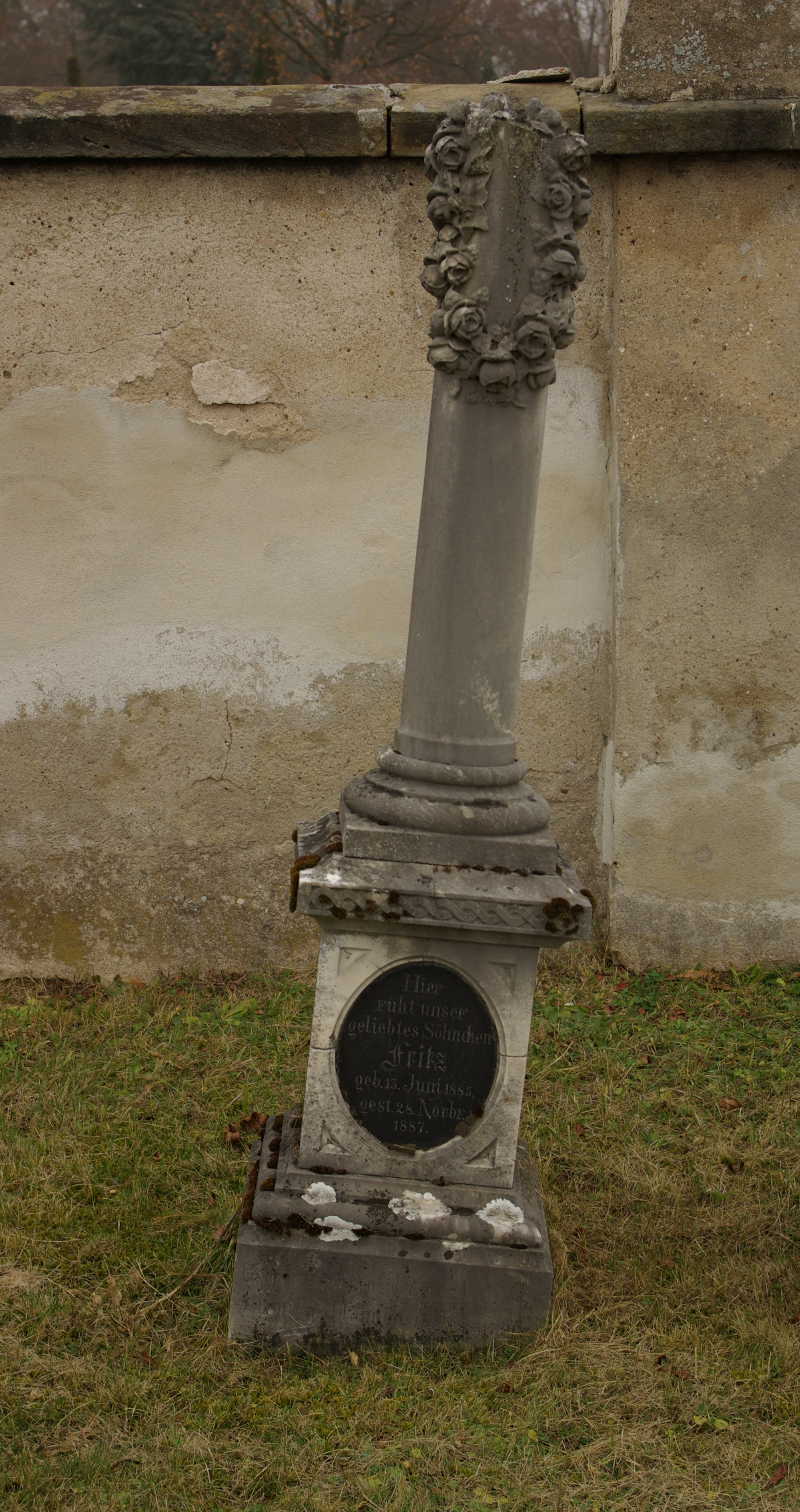 Jüdischer Friedhof in Bamberg